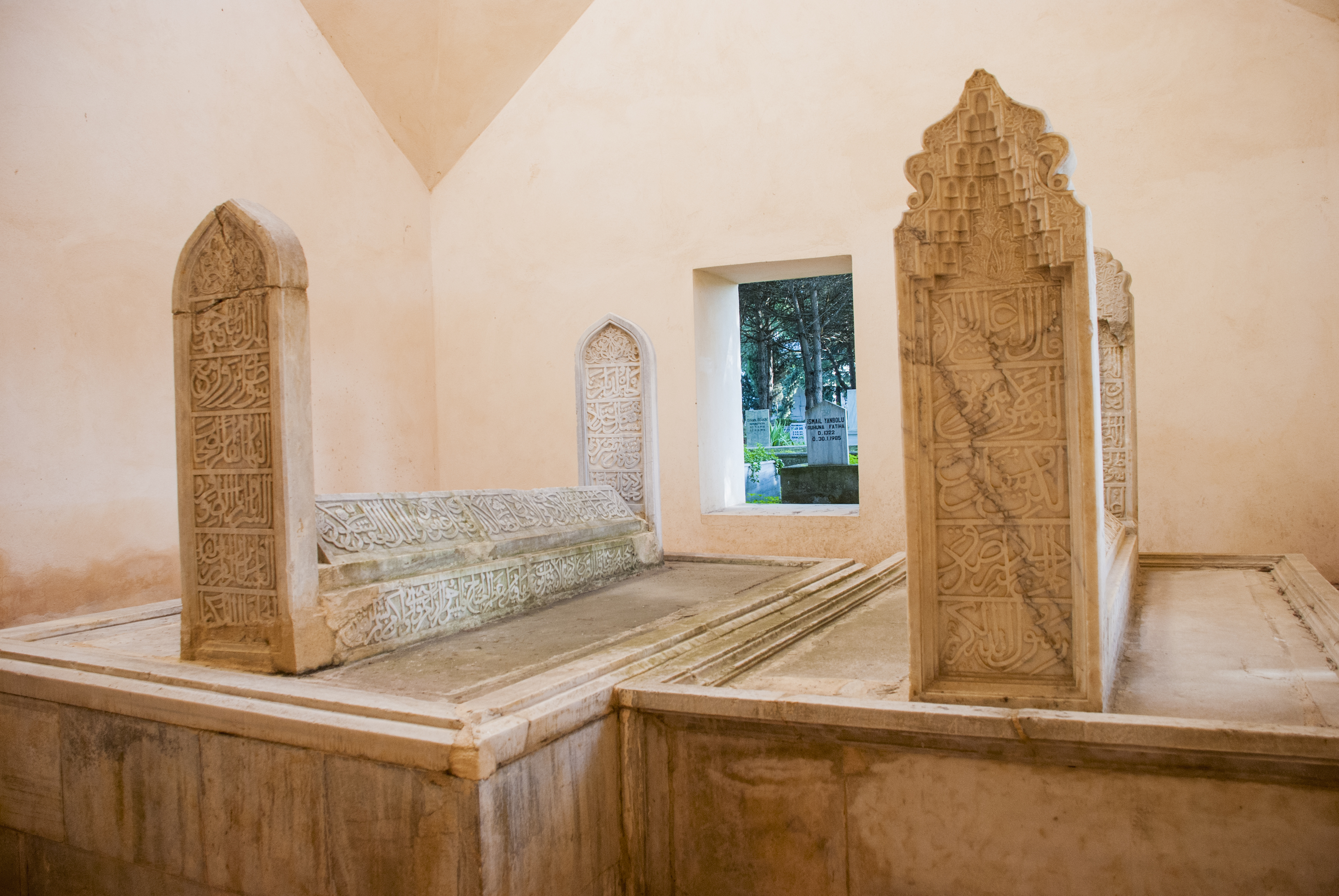 Çandarlı Ali (solda), ve Çandarlı Halil Paşa (sağda) kabirleri, İznik, Bursa